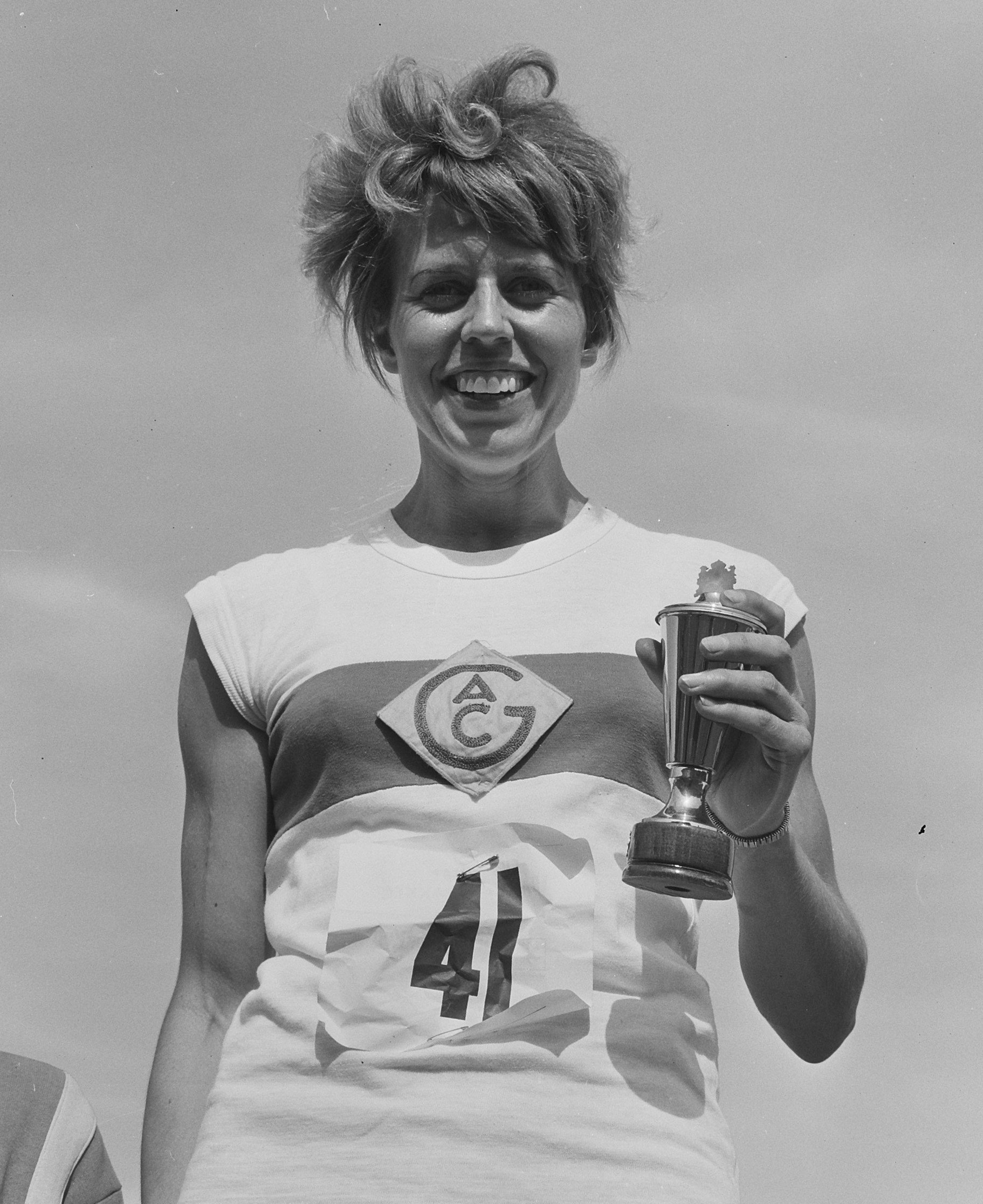 Jannie van Eyck-Voes